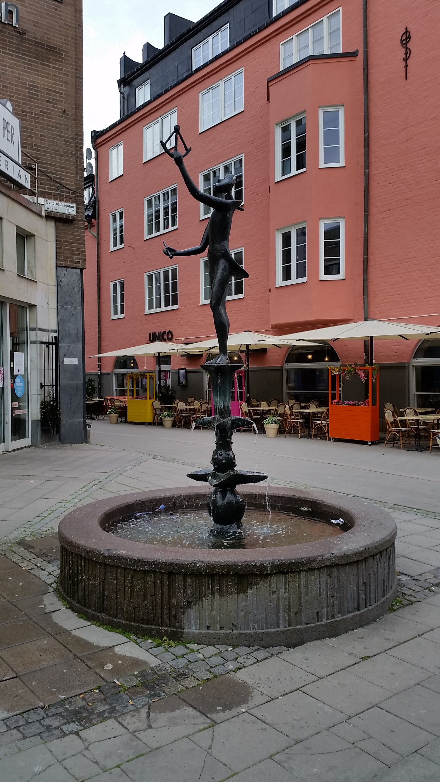 Fem på sextant (1971) - Astrid du Rietz. Uppsala It is not clear whether freedom of panorama applies to this image. This is a depiction of a building or work of art in Sweden. The depicted work is believed to be protected by copyright. According to Article 24 of the Swedish copyright act, "Works of art may be depicted if they are permanently placed on or at a public place outdoors. Buildings may be freely depicted." It has been widely accepted that this provision made distribution of depictions such as this one legal. On 4 April 2016, however, the Supreme Court of Sweden issued a statement that Article 24 does not extend to publication in online repositories, and on 6 July 2017, a lower court ruled that linking to depictions of copyrighted artworks hosted on Commons constitutes copyright infringement. See COM:CRT/Sweden#Freedom of panorama for more information. The implications of these decisions on Commons' ability to continue to distribute this and other depictions like it are currently under analysis. Reusing or linking to this file may have legal consequences. You are solely responsible for ensuring that you do not infringe the copyright belonging to someone else. See our general disclaimer for more information.